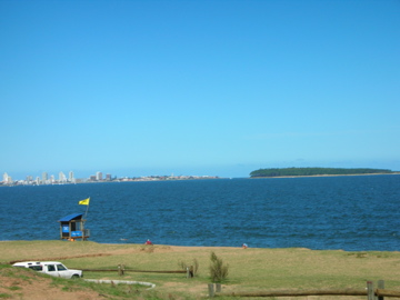 La isla Gorriti a la derecha de la imagen